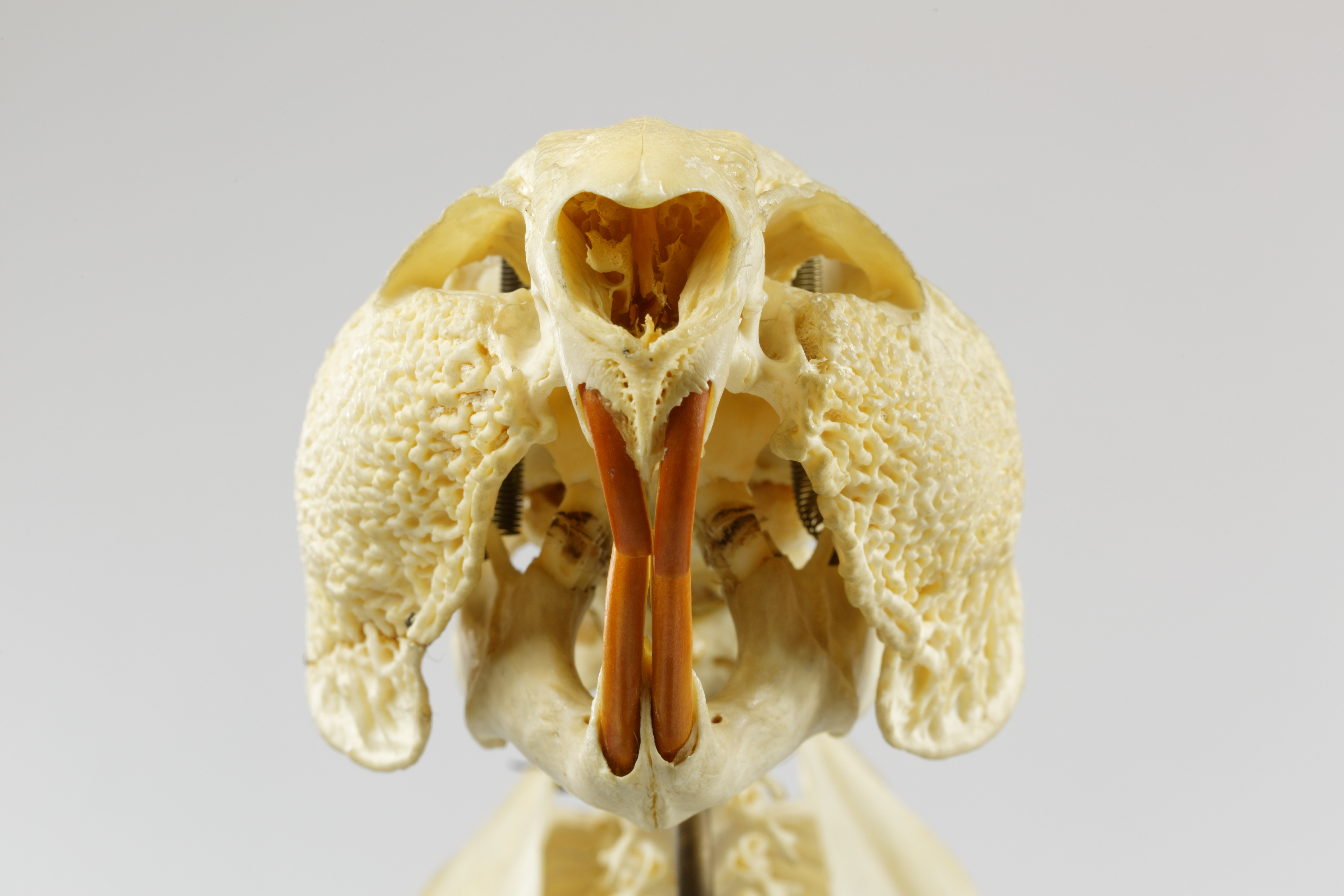 Un paca - Cuniculus pacas - de la collection de l'Université Pierre-et-Marie-Curie à Paris.